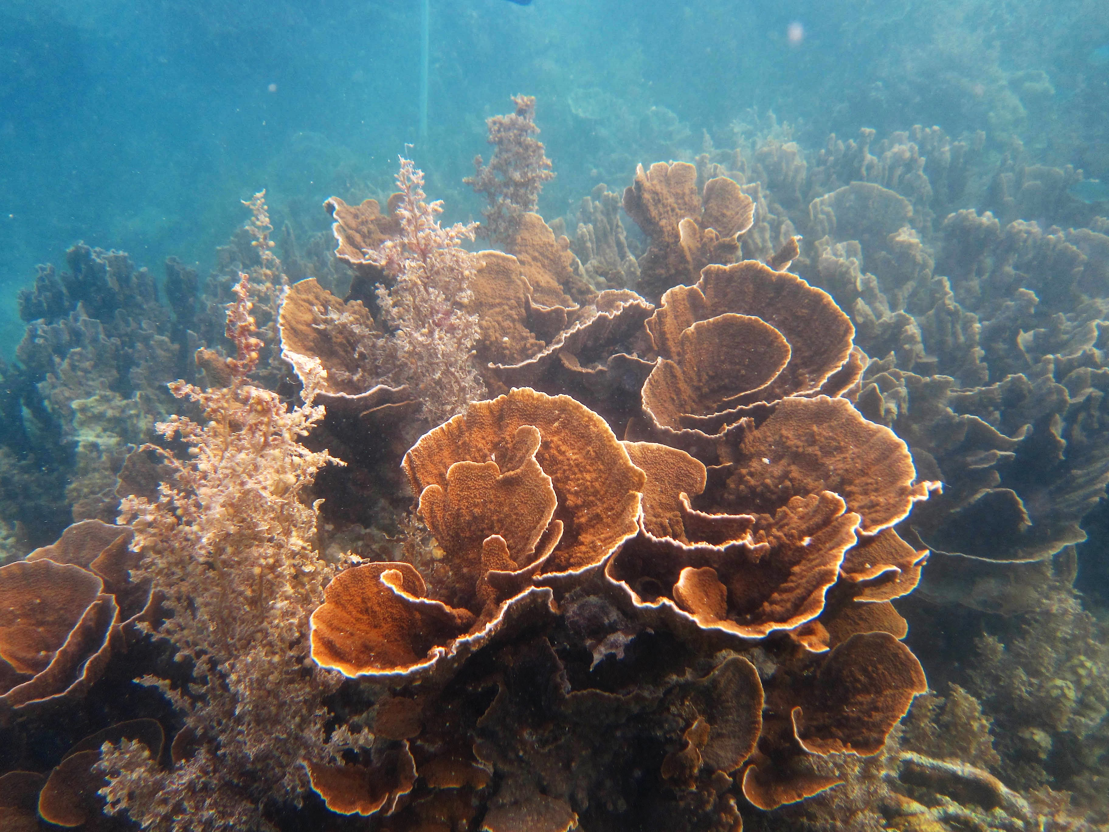 Montipora aequituberculata, Ningaloo Reef, Australia. Global Coral Microbiome Proyect.